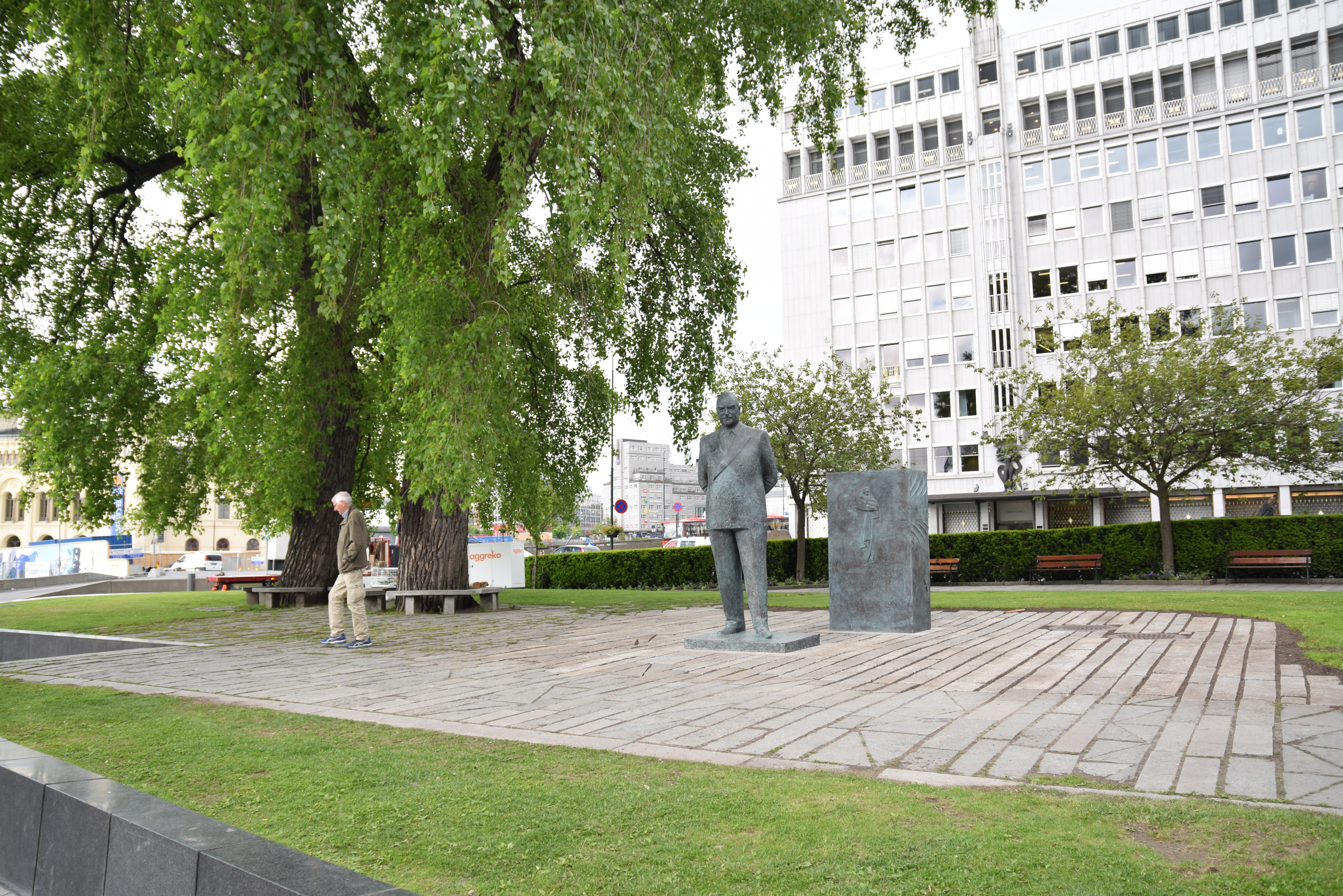 Olav Vs plass med den opphøyede midtdelen og minnesmerke over Kong Olav V, som ble avduket 7. juni 2015